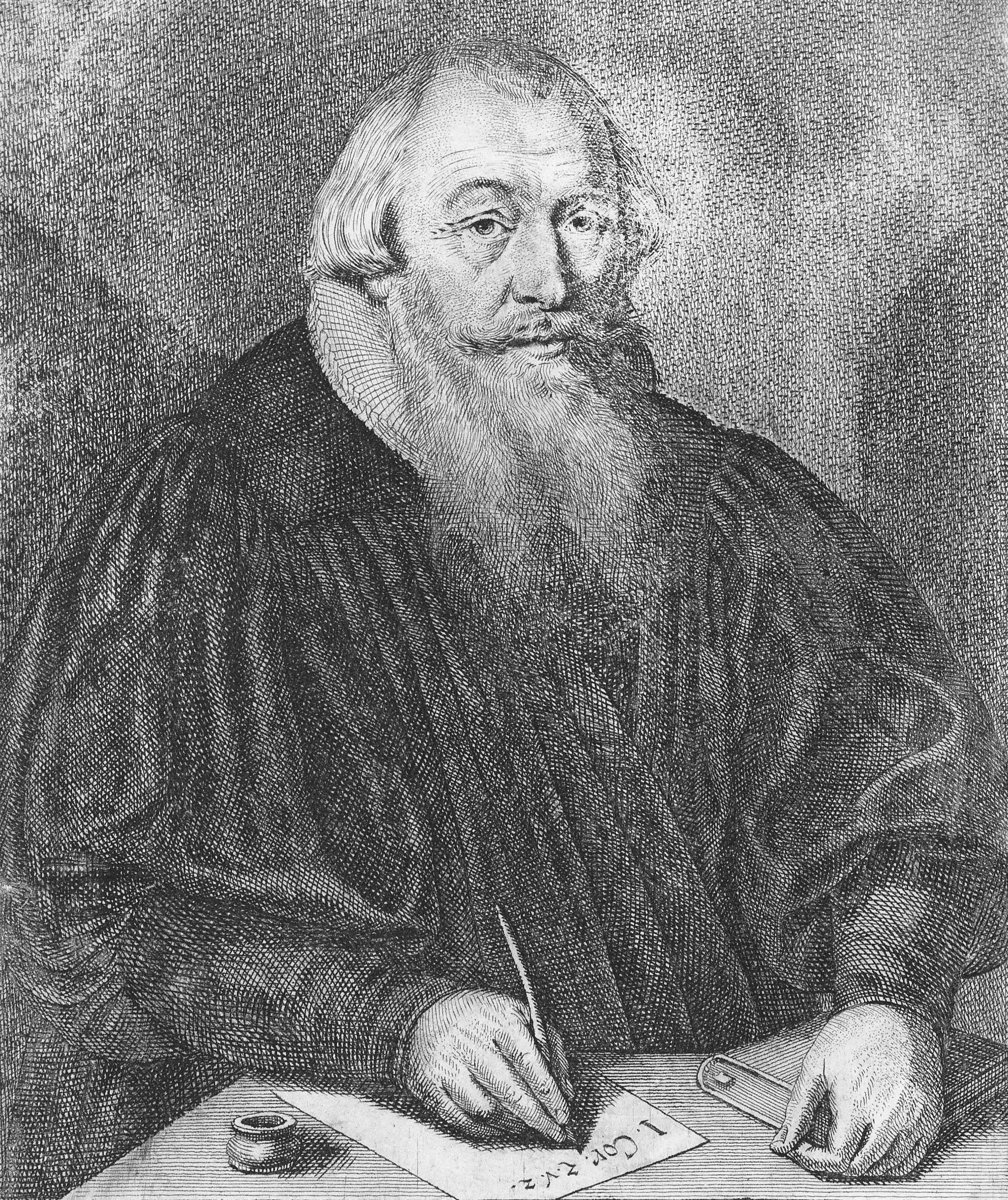 Radierung von Johann Jakob Ulrich (1602-1668)